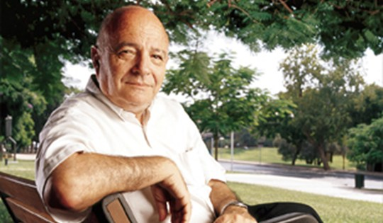 פרופסור לחקלאות אילן חת